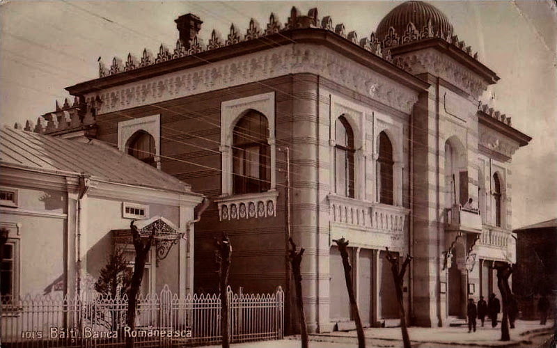 Banca Românească din Bălţi